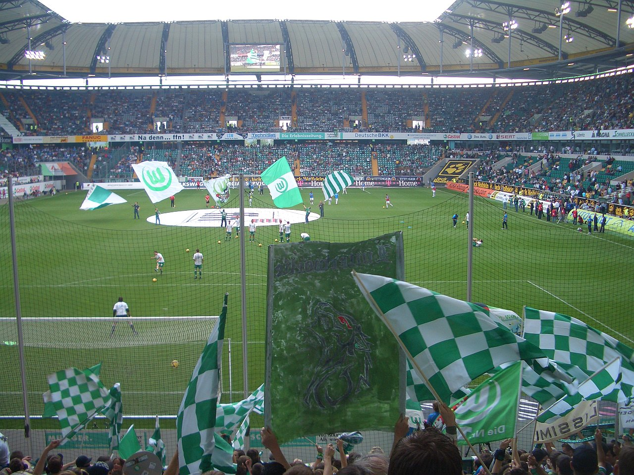 VfL Wolfsburg - TSG Hoffenheim (4:0) 02.05.09 Grün Weiß Kariert so weit das Auge reicht. Nehmt eure Fahnen wieder mit ins Stadion und tragt euren Teil bei zum Optischen Auftritt in unserem Vfl Stadion.